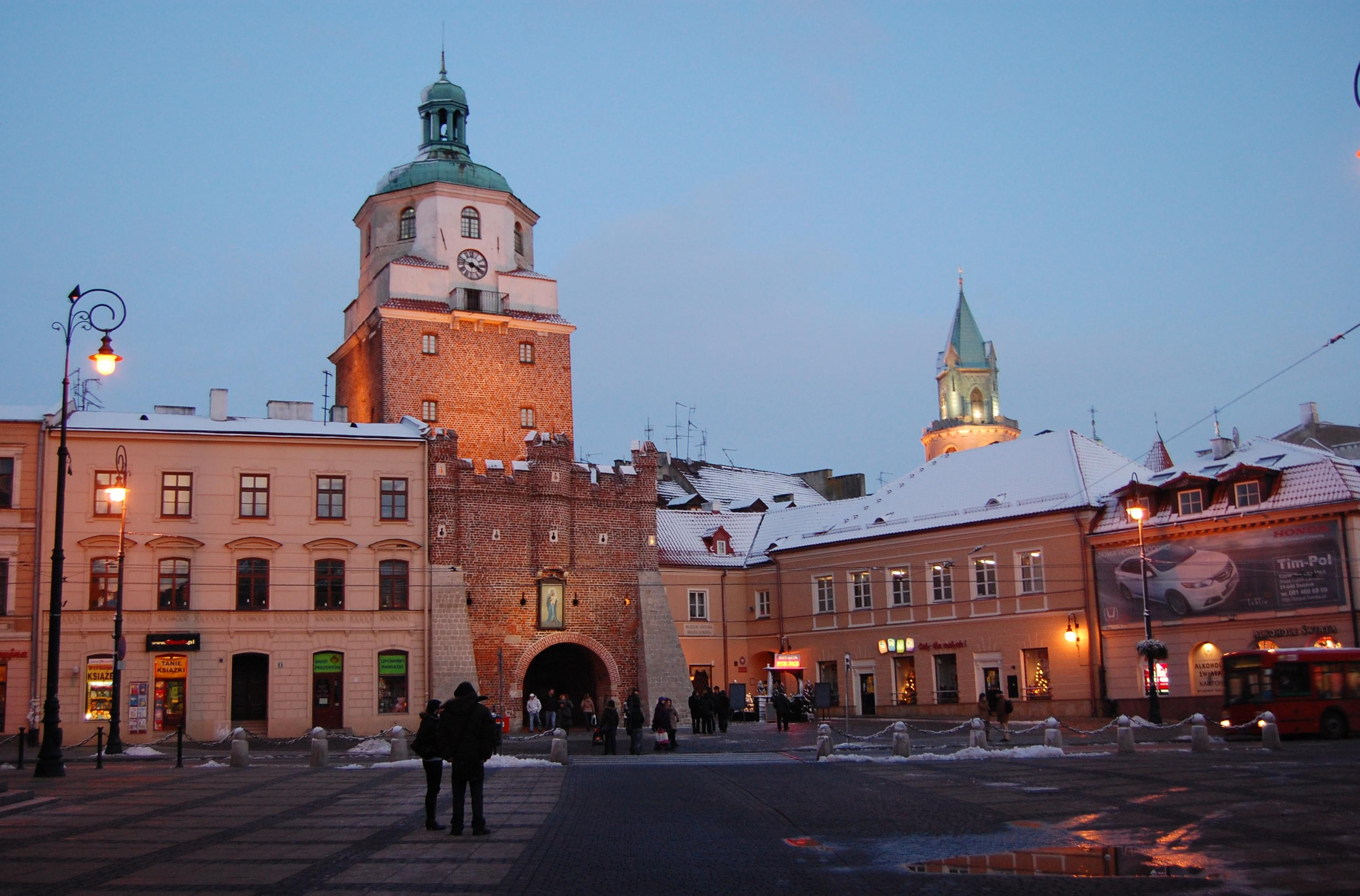 Brama Krakowska w Lublinie